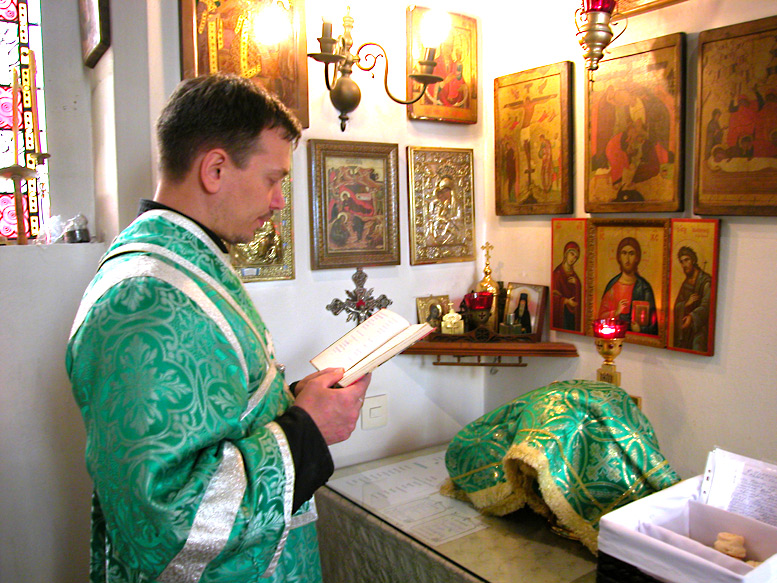 Kirche «Maria Obchut» in Düsseldorf